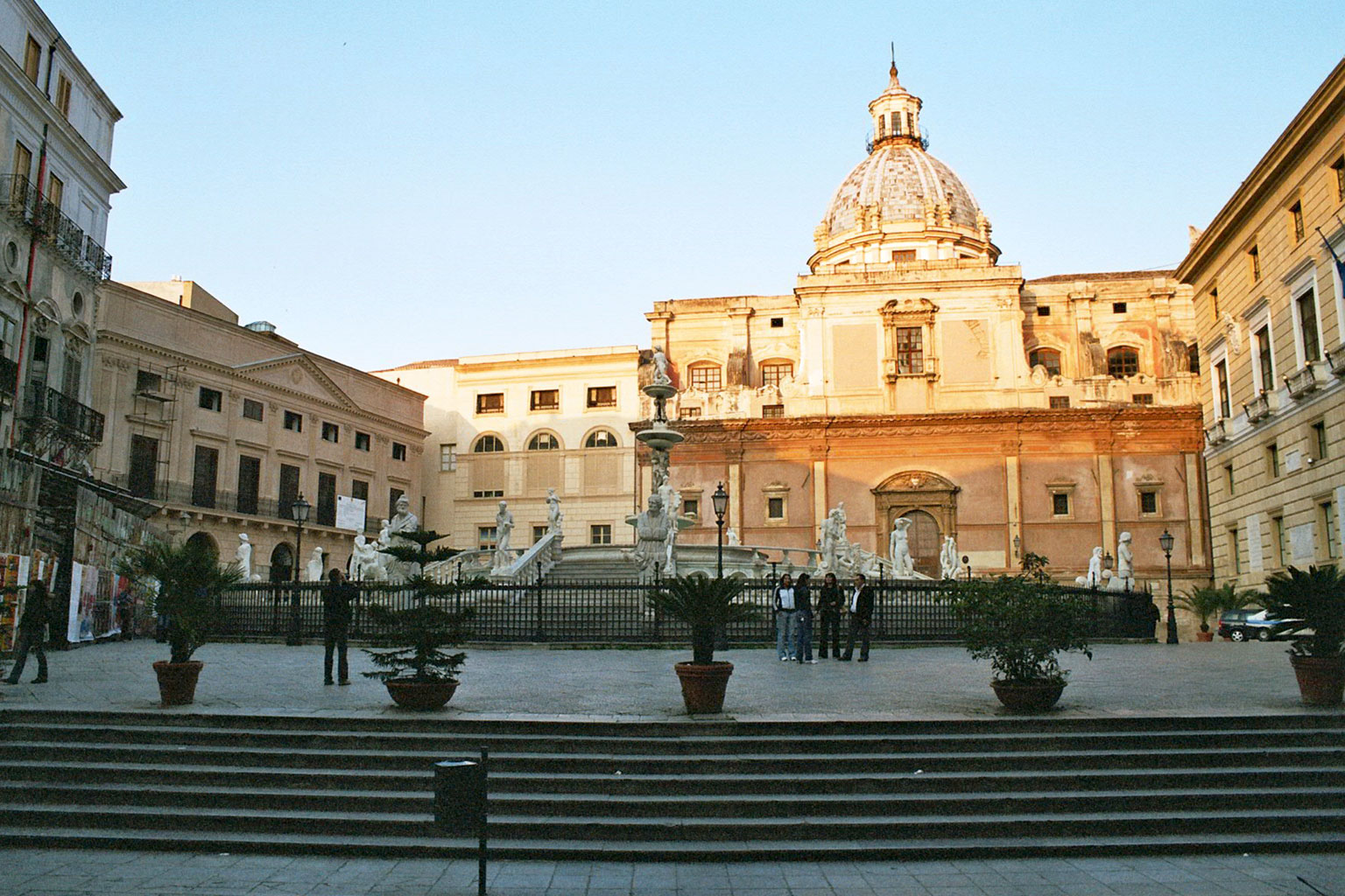 Piazza Pretoria, Palermo Total view from Via Maqueda